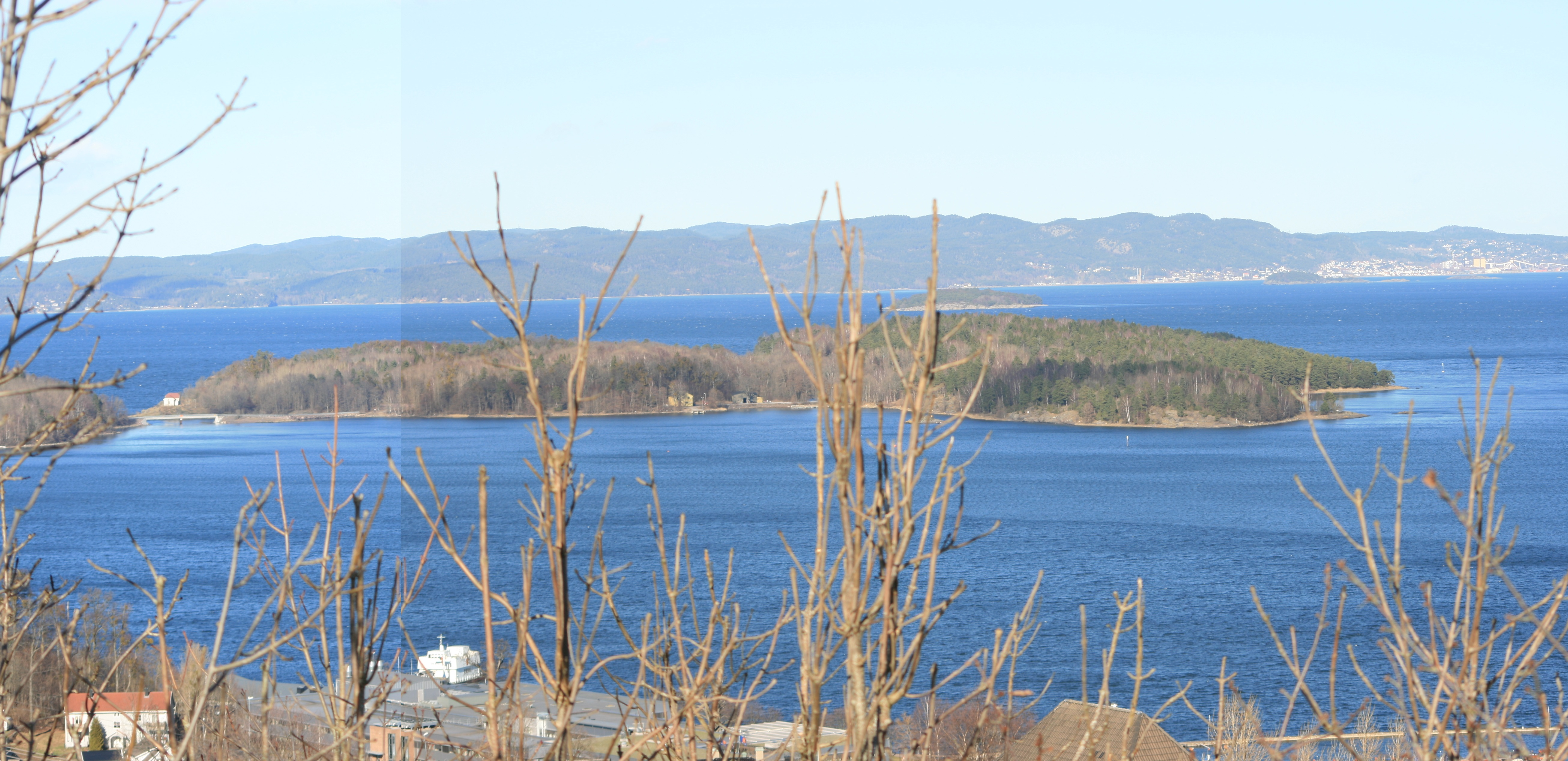 Hele Østøya, sett fra Bassengtaket.